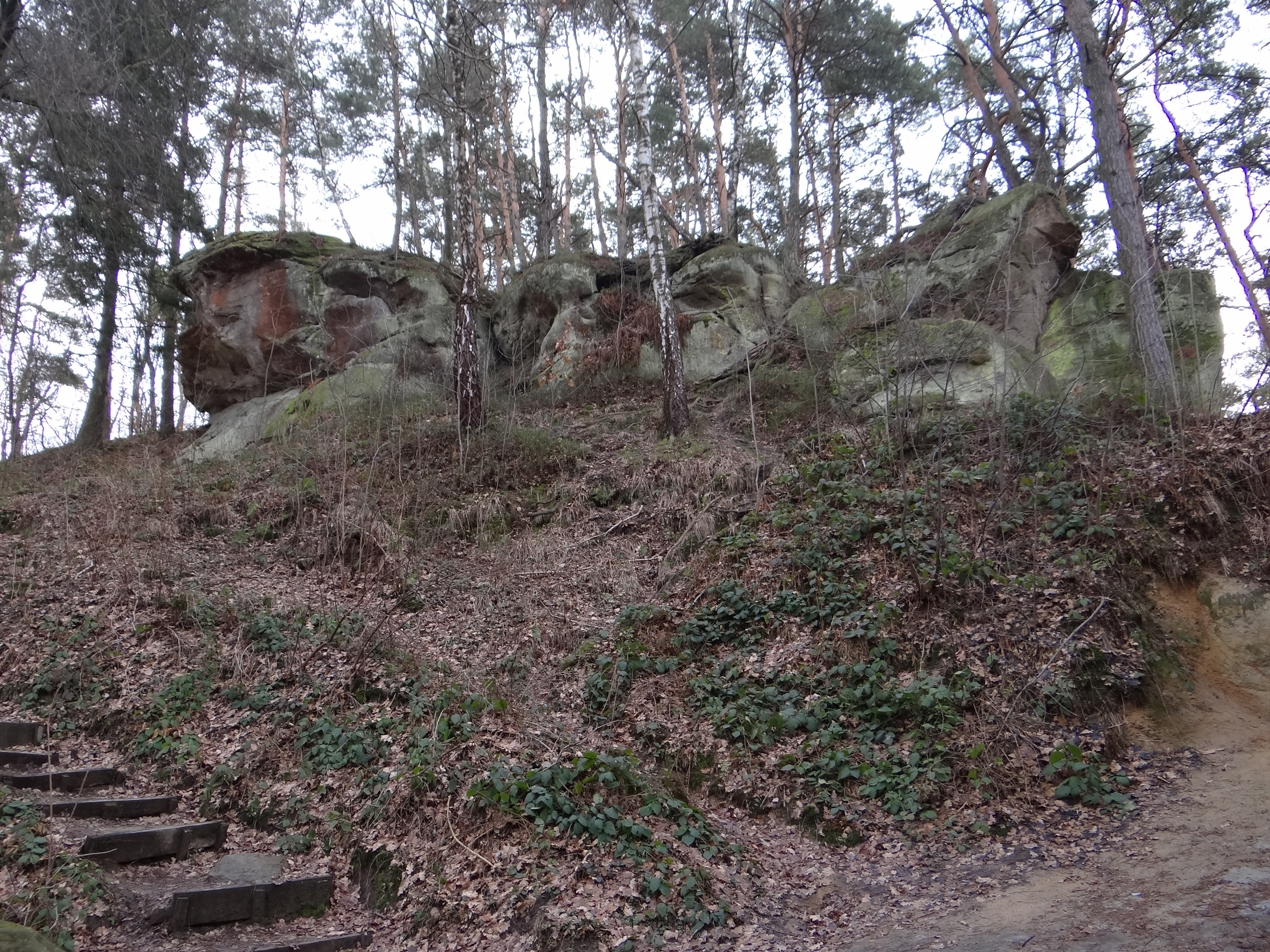 Skała "Aligator" w Skamieniałym Mieście w Ciężkowicach